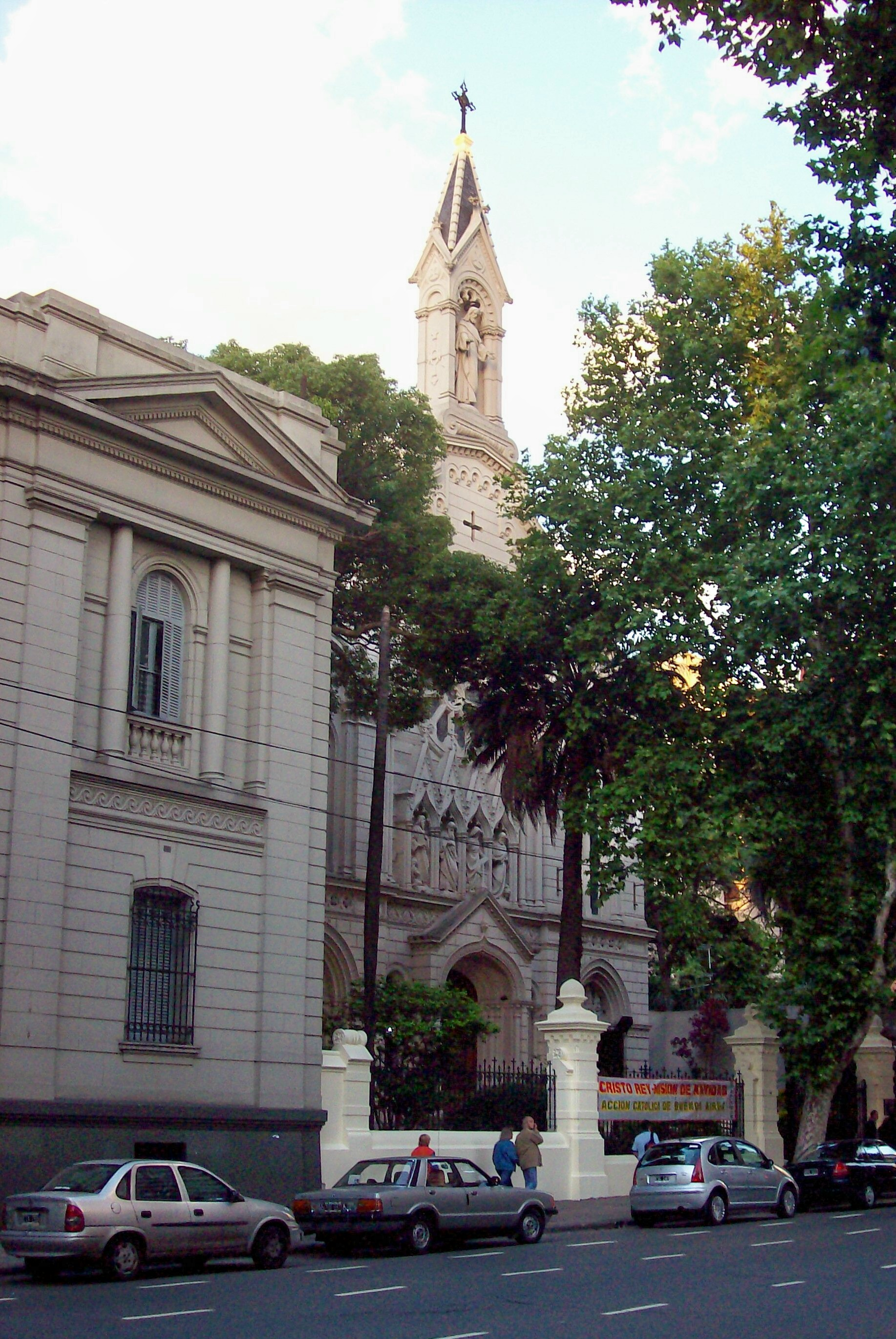 Templo de Jesús Sacramentado, en Avenida Corrientes 4433, entre calles Pringles y Yatay (Ciudad de Buenos Aires).